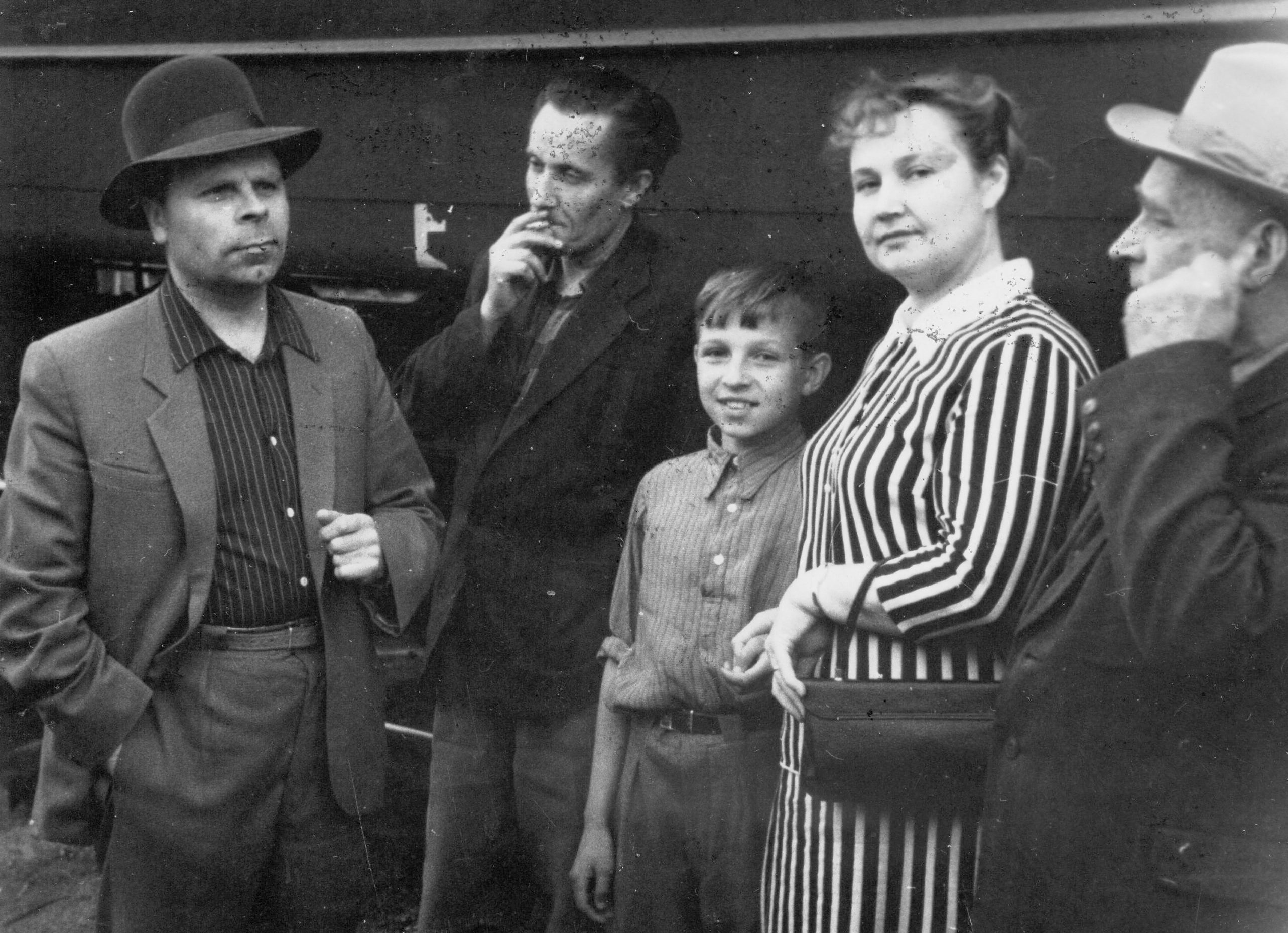 На снимке - слева направо: 1. Козырев А.И. 2. Забелин - главный художник драмтеатра 3. Сын Козырева А.И. 4. Жена Козырева А.И. 5. Ильюшин В.Ф. - заслуженный художник